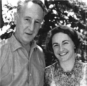 Bohuslav Martinu (1890-1959) avec la pianiste suisse Margrit Weber (1924-2001), en Suisse vers 1957. Margrit Weber est la dédicataire du cinquième concerto pour piano et orchestre de Martinu dont la création se situe le 31 janvier 1959 à Berlin.